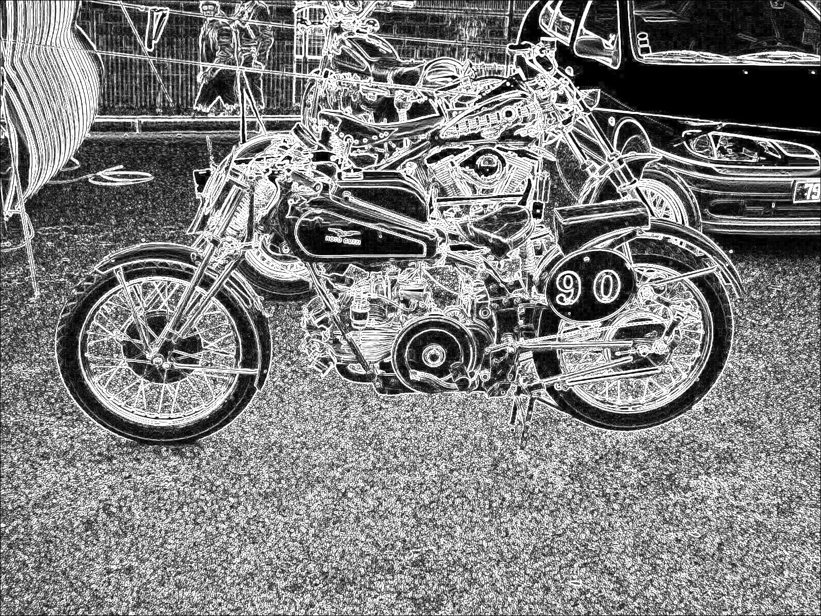 Aplicacion de un algoritmo de deteccion de bordes